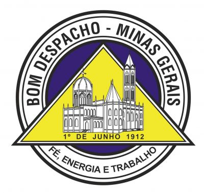 Brasão de Armas do município de Bom Despacho, Minas Gerais, Brasil.